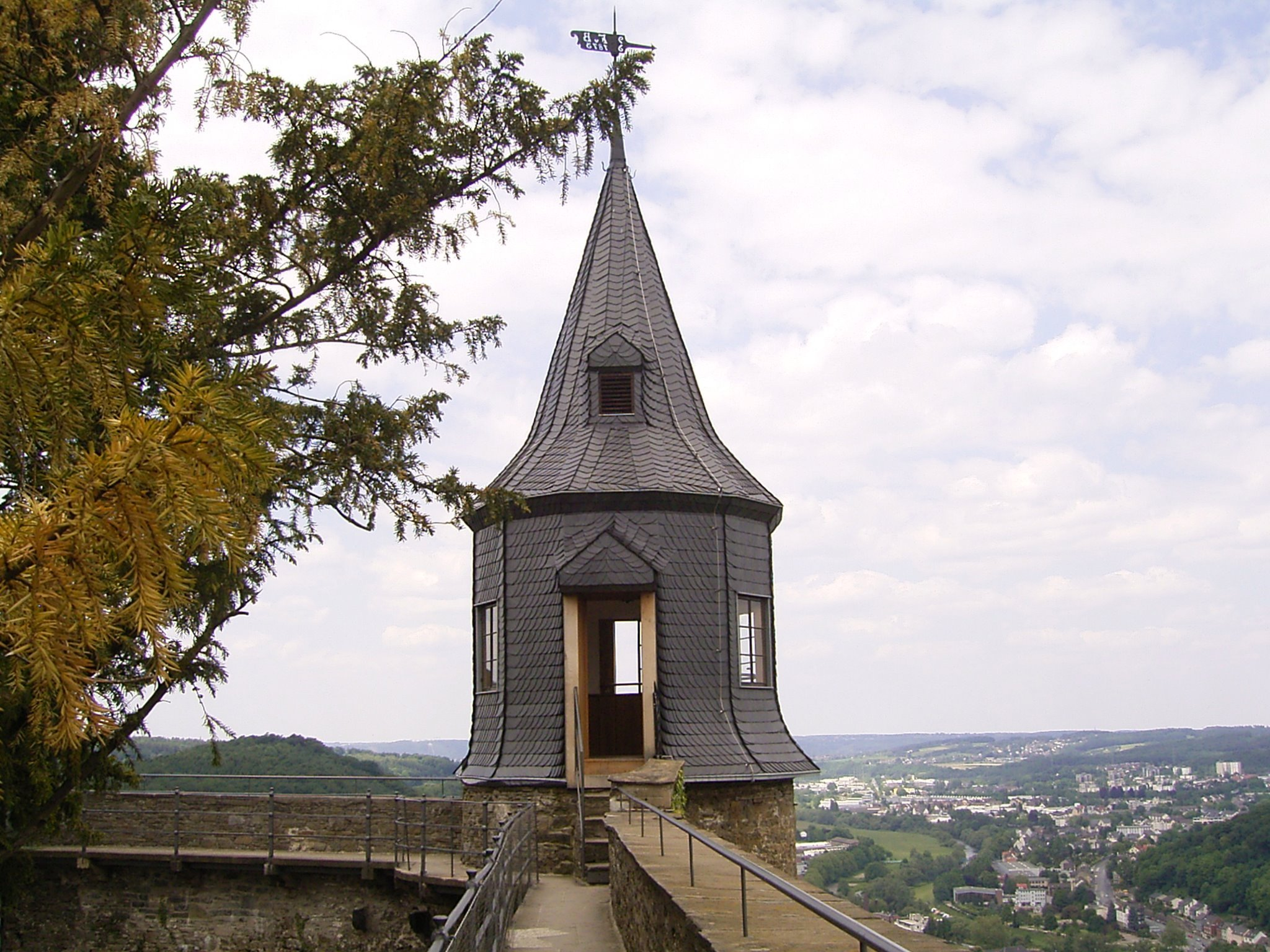 Schloss Hohenlimburg in Hagen-Hohenlimburg